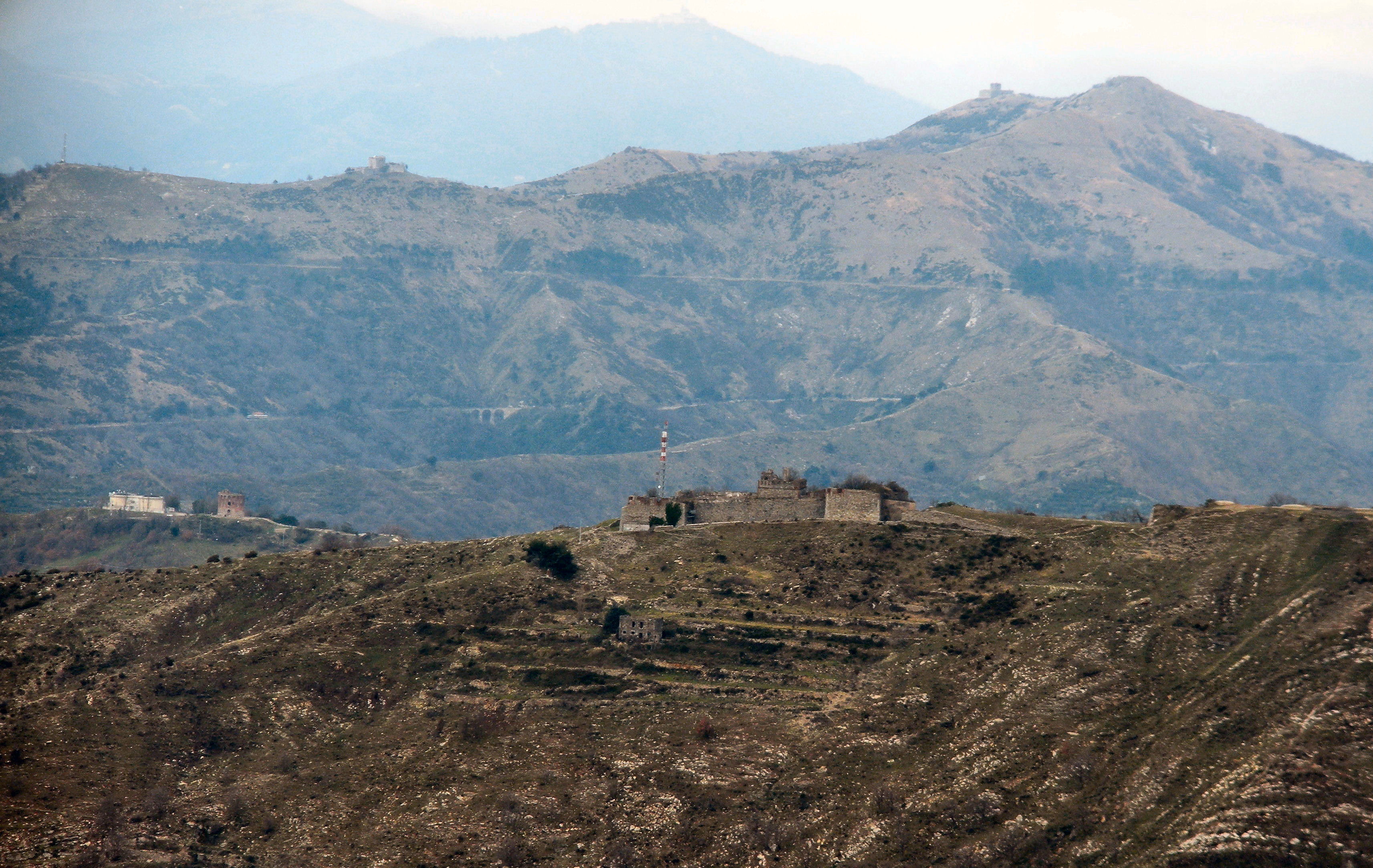 Genova, il forte Richelieu visto dal Monte Fasce